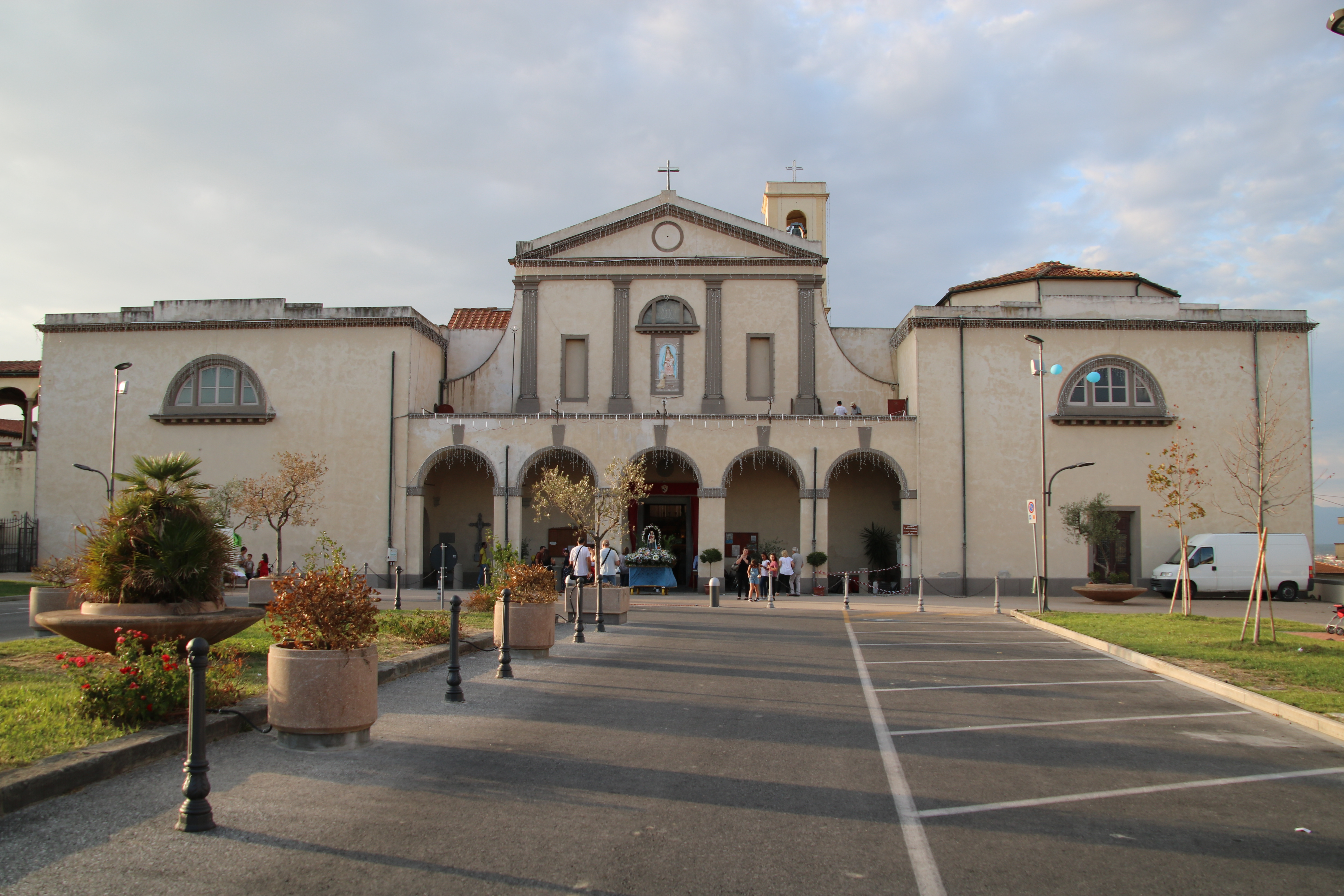 Santuario della Madonna di San Romano (Montopoli in Val d’Arno)